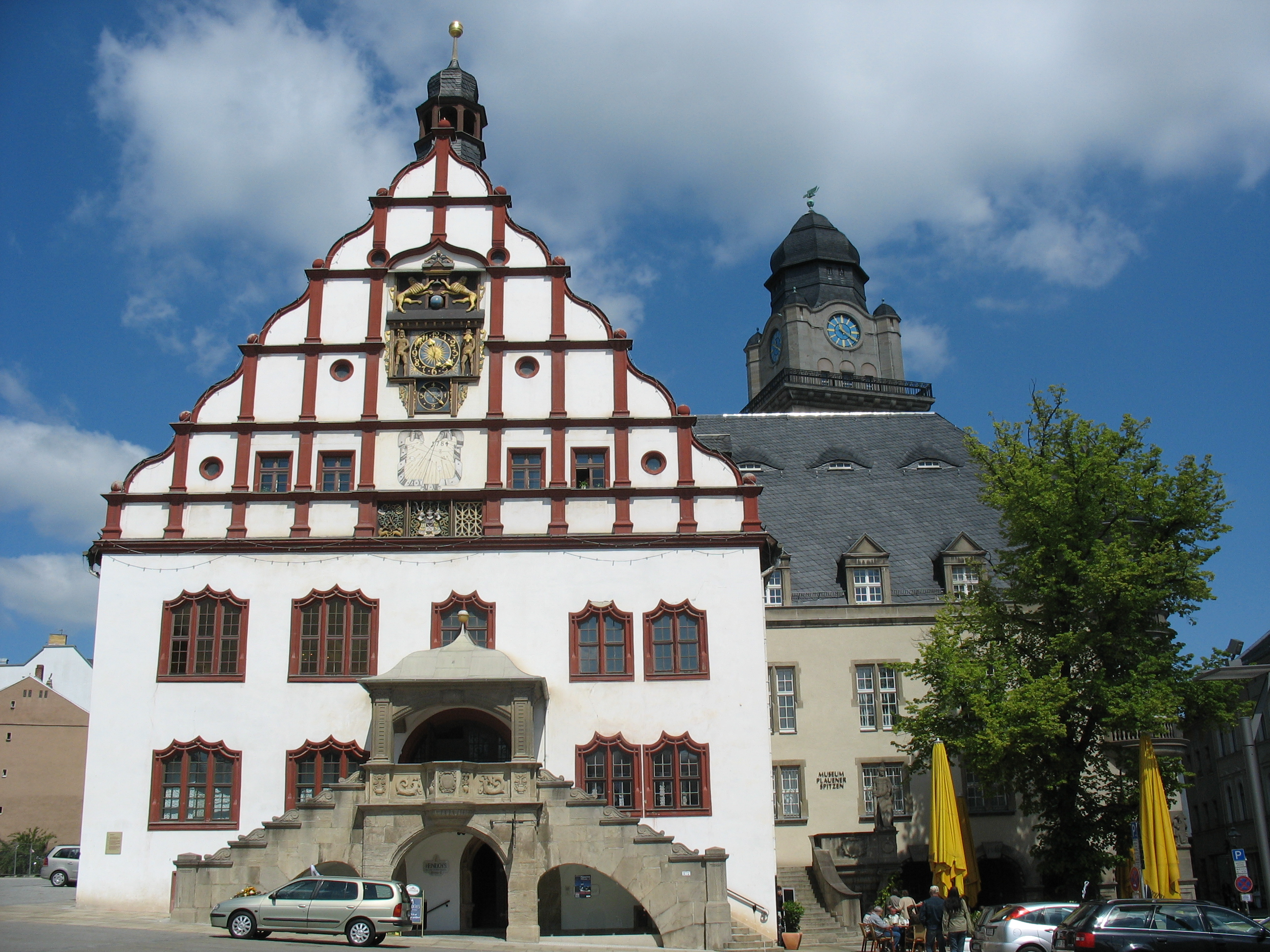 Plauen, Giebel des Alten Rathauses und Turm des Neuen Rathauses